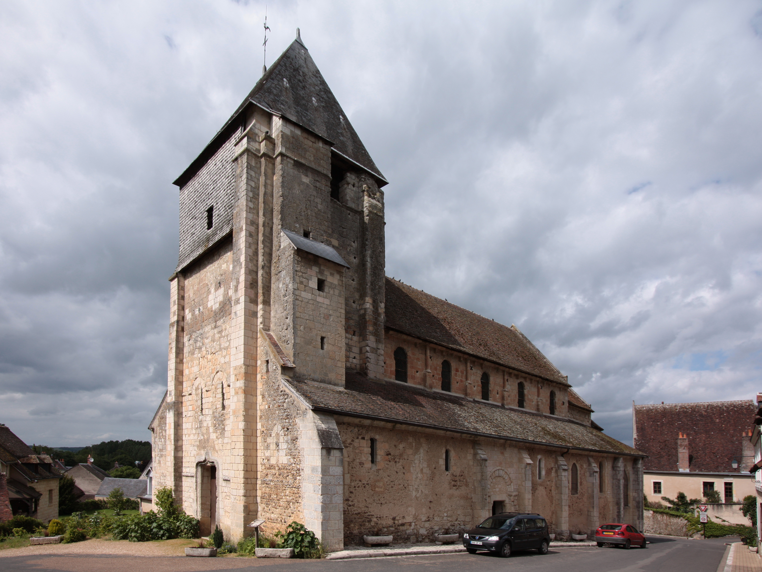 Lavardin im Departement Loir-et-Cher/Frankreich - Kirche Saint-Genest.